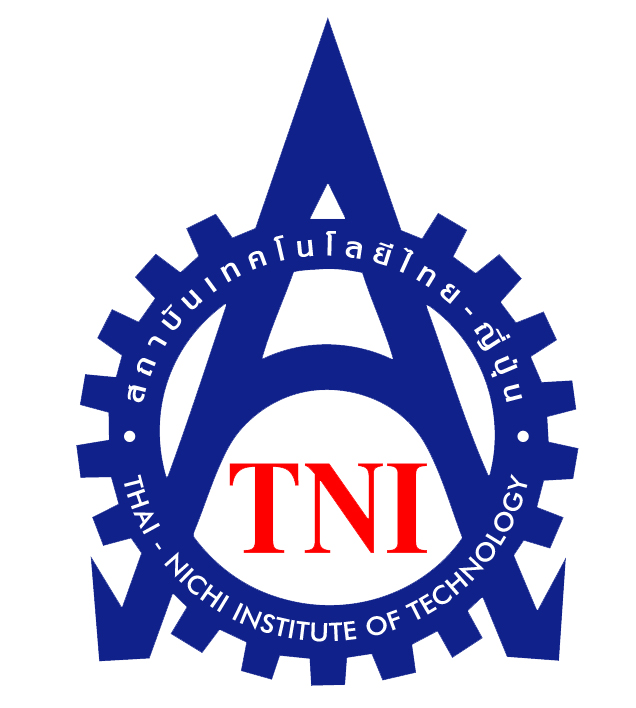 Logo สถาบันฯ